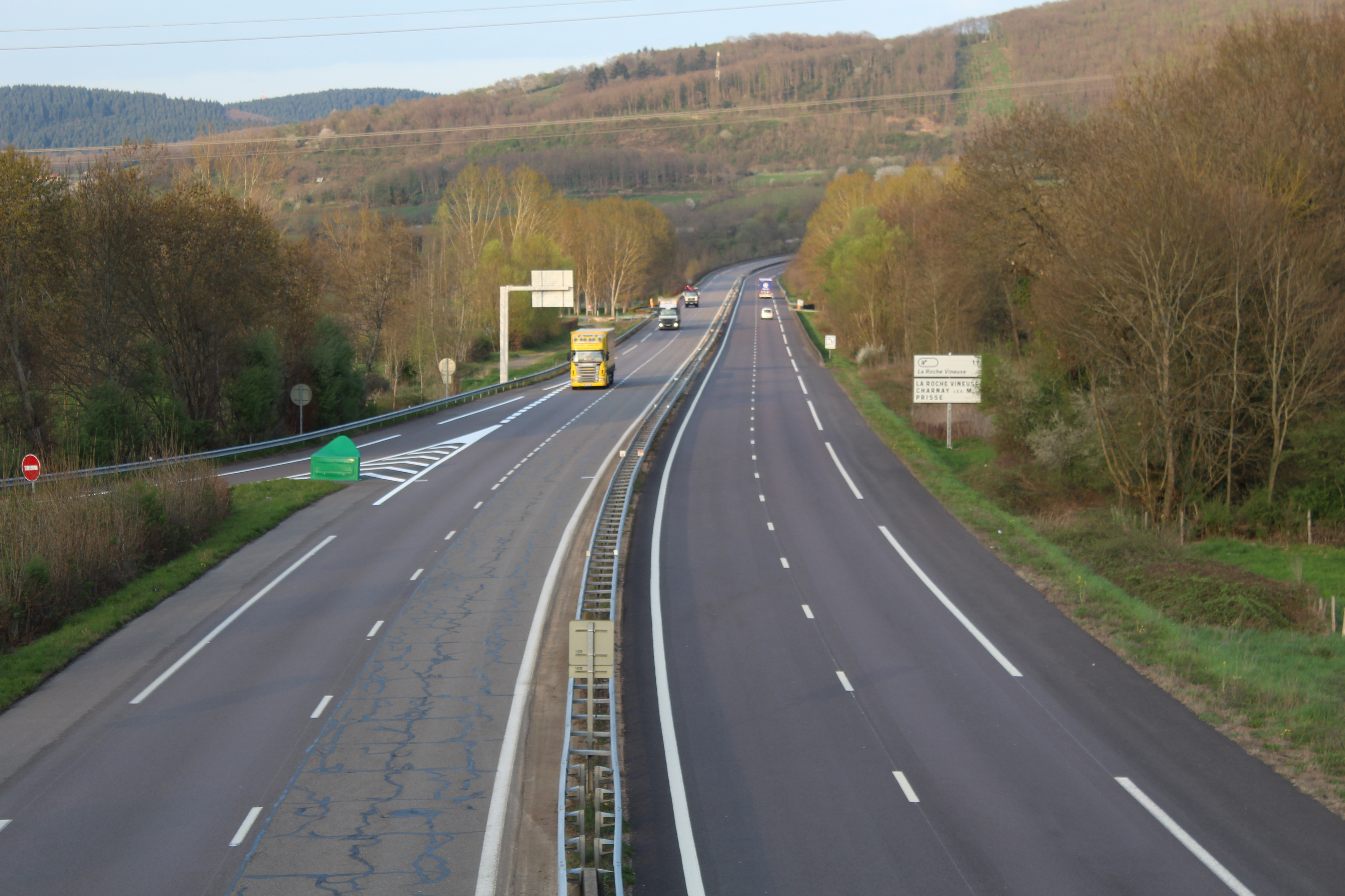 Route nationale 79, RCEA, Sainte-Cécile, Saône-et-Loire.